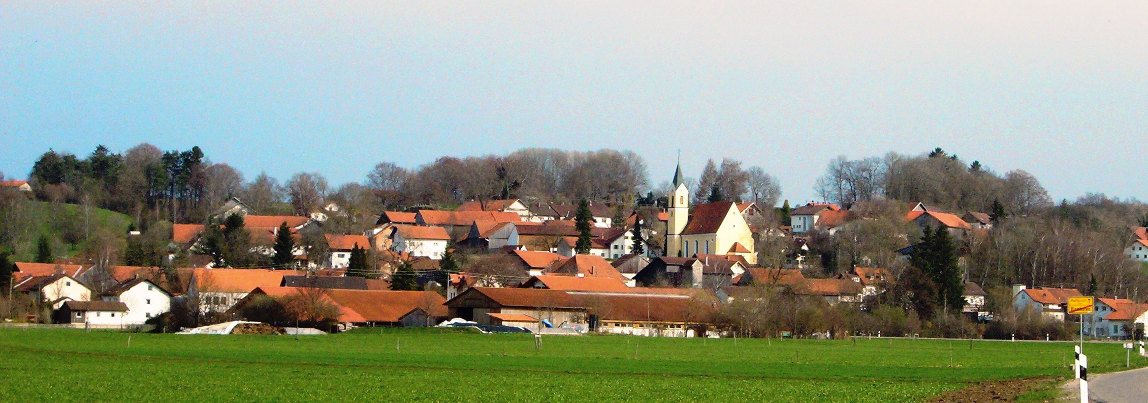 Gemeinde Aufkirch im Landkreis Ostallgäu von Blonhofen aus gesehen. Aufkirch, Bavaria, Germany